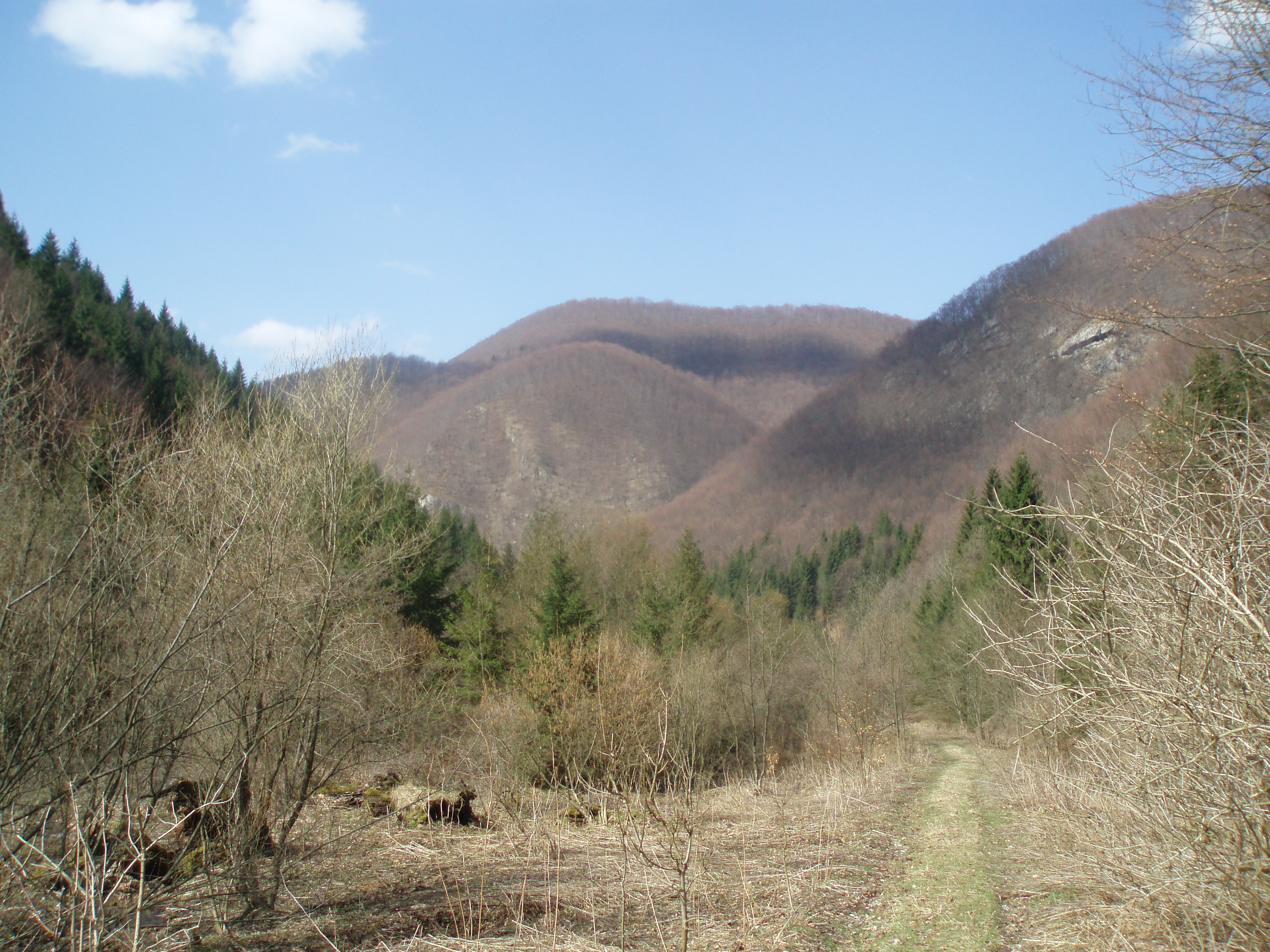 Národná prírodná rezervácia Veľká Bránica, pohľad z juhu (National nature reserve Veľká Bránica, Lesser Fatra, Slovakia), view from south